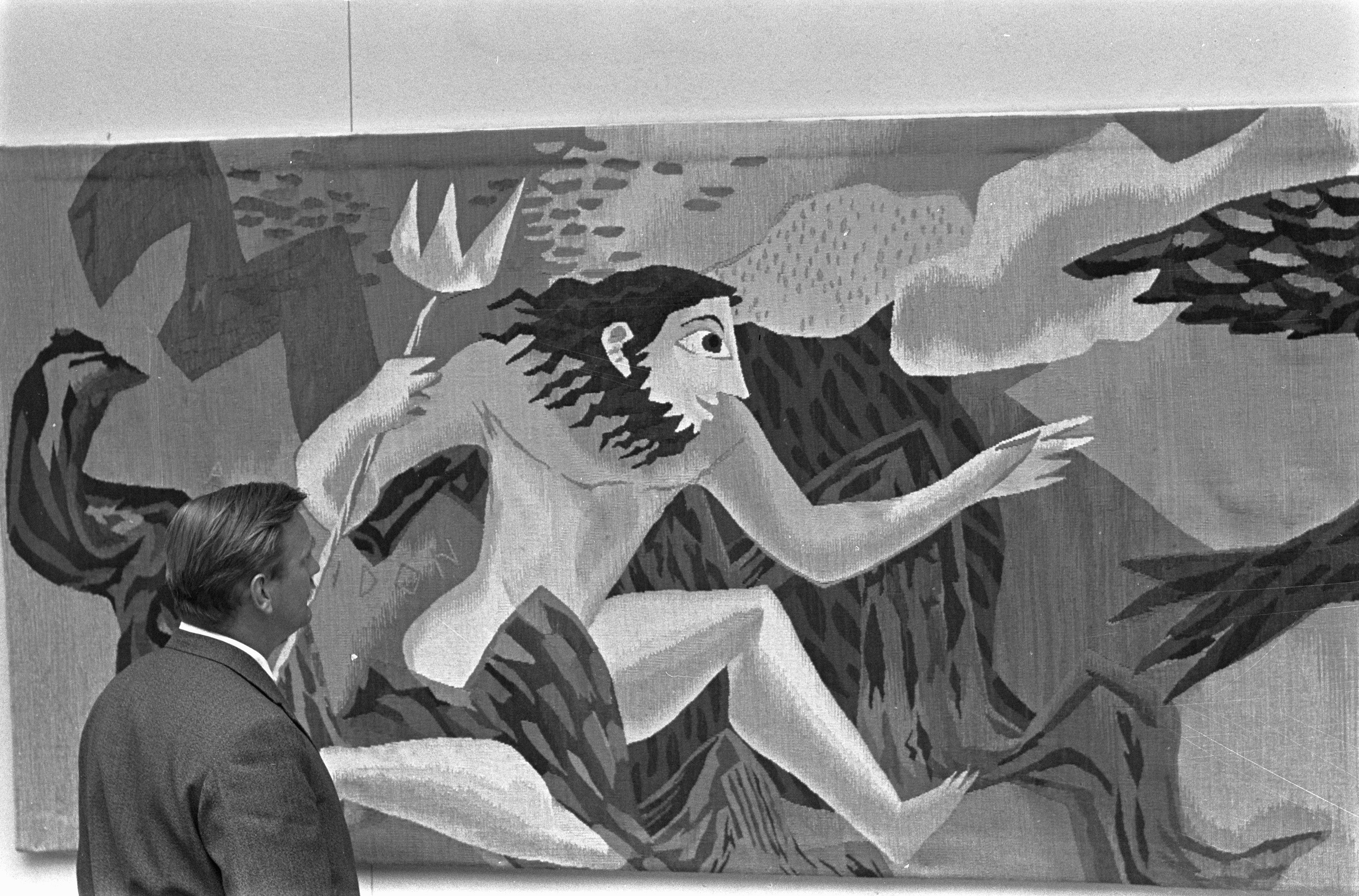 Collectie / Archief : Fotocollectie Anefo Reportage / Serie : [ onbekend ] Beschrijving : Expositie van wandtapijten van de Rotterdam gemaakt door Gisela Van Waterschoot Van de Gracht Datum : 27 juli 1959 Fotograaf : Pot, Harry / Anefo Auteursrechthebbende : Nationaal Archief Materiaalsoort : Negatief (zwart/wit) Nummer archiefinventaris : bekijk toegang 2.24.01.05 Bestanddeelnummer : 910-5524